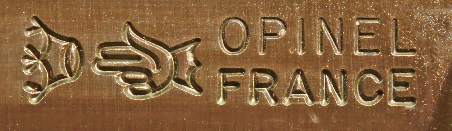 Opinel-Logo op enger Messerschneid